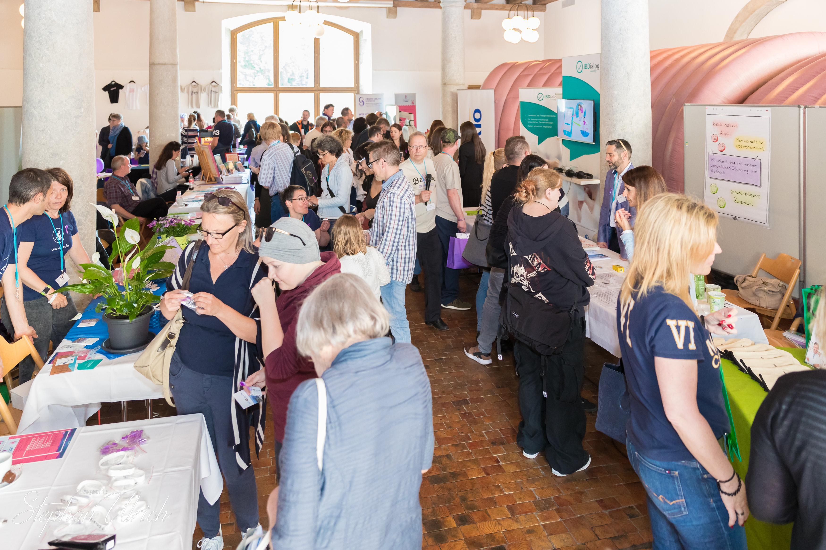 Welt-CED-Tag 2018 im Landhaus Solothurn